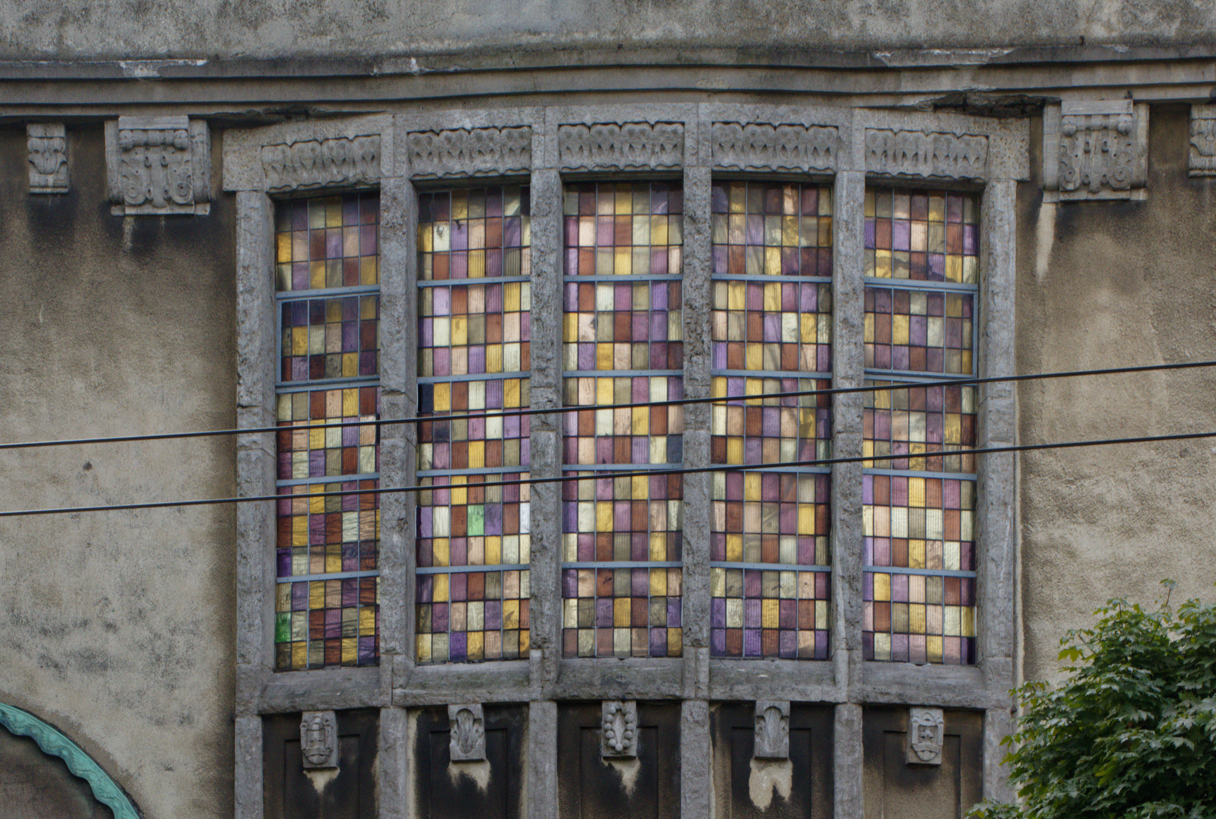 Dorper Kirche Solingen, Fenster